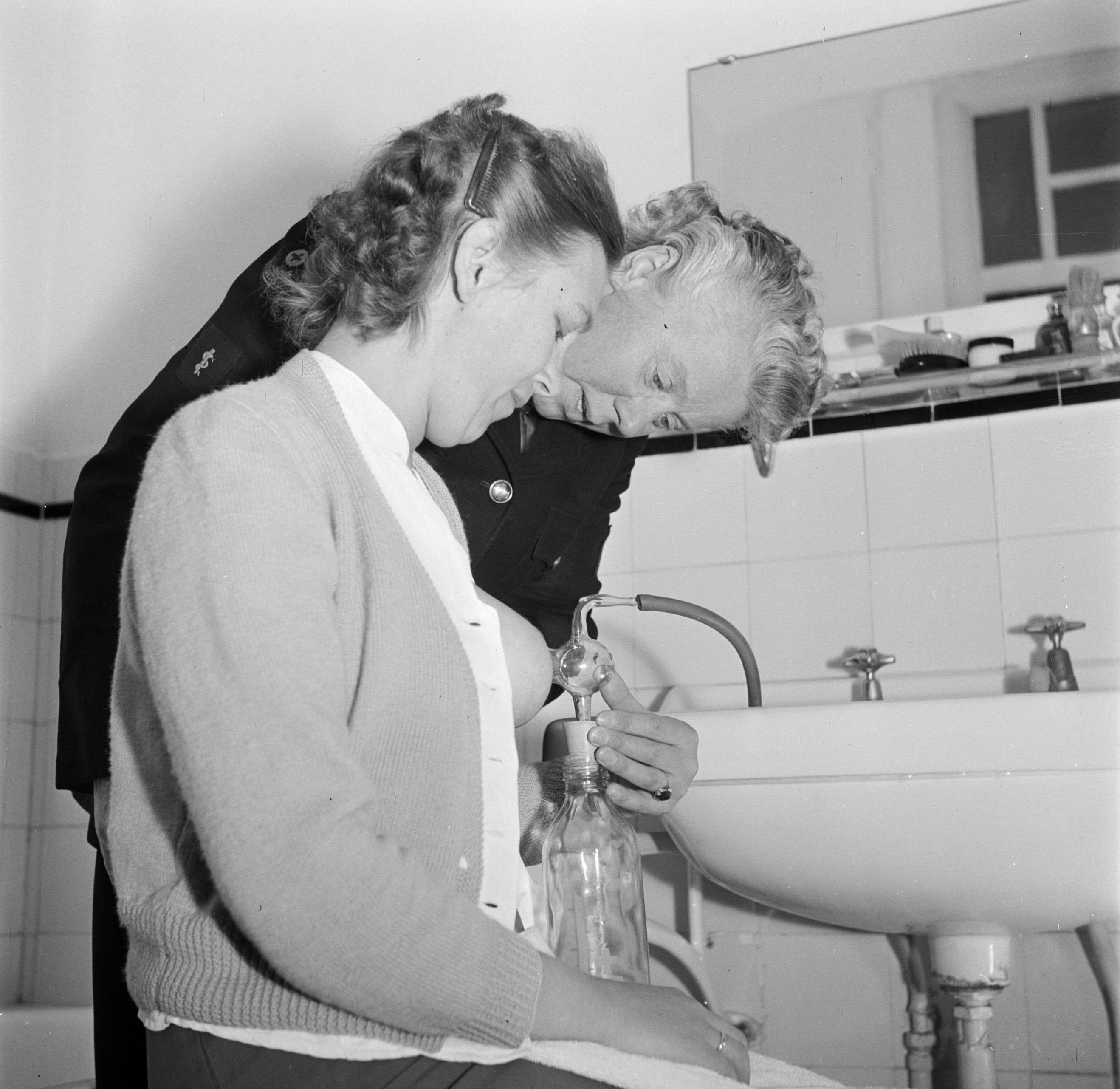 Moedermelkcentrale van het Nederlandse Rode Kruis. Zuster M.G. Niemeyer assisteert mevrouw Rietveld bij het kolven met behulp van de borstpomp. Mei 1954